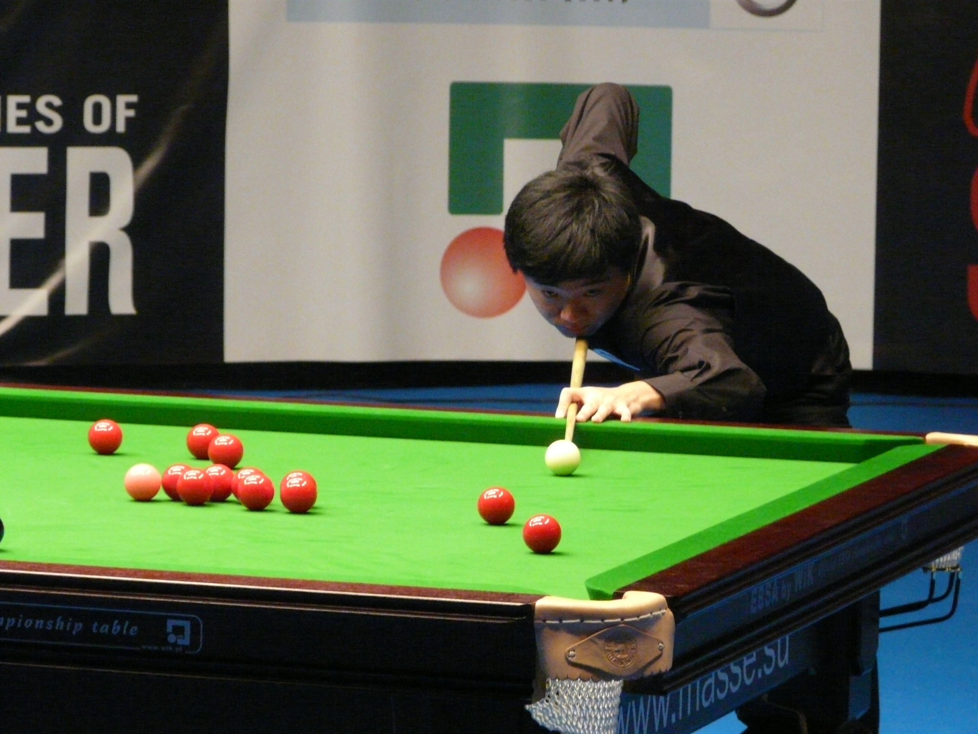 Туринир World Series of Snooker в Москве